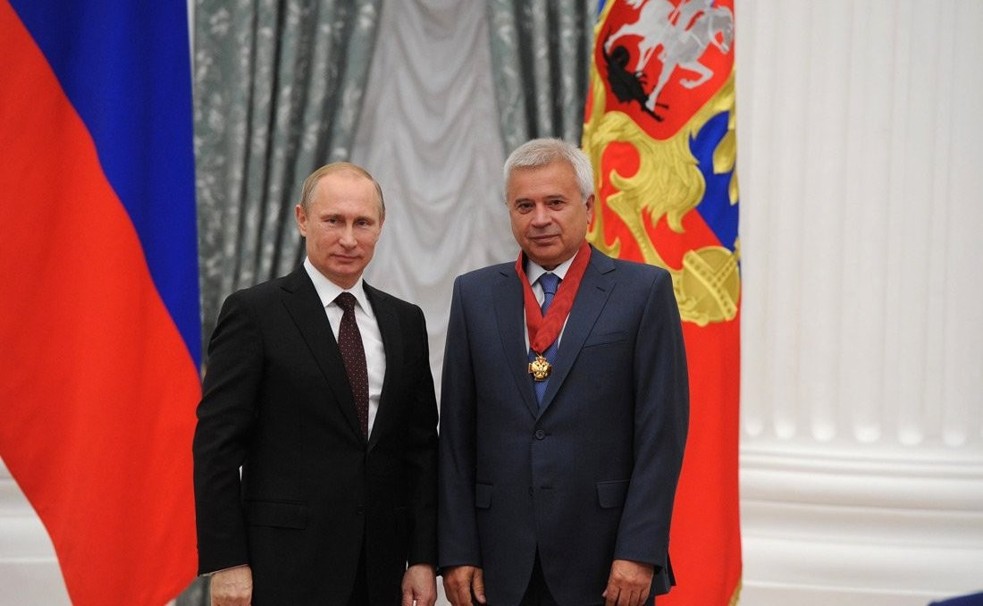 Орденом «За заслуги перед Отечеством» II степени награждён президент ОАО «Нефтяная компания «ЛУКОЙЛ» Вагит Алекперов